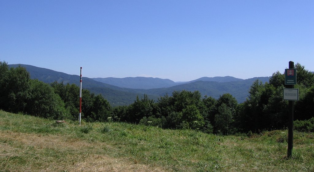 Nad Roztokami pass (view southwards) / Przełęcz nad Roztokami Górnymi (widok na południe)